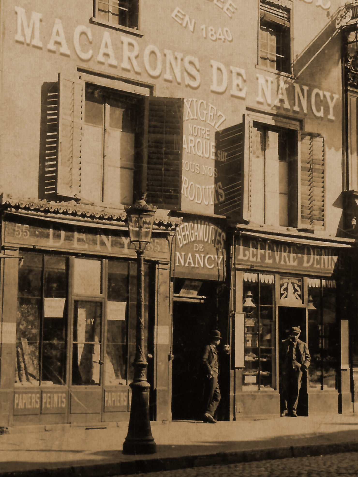 photographie des années 1890